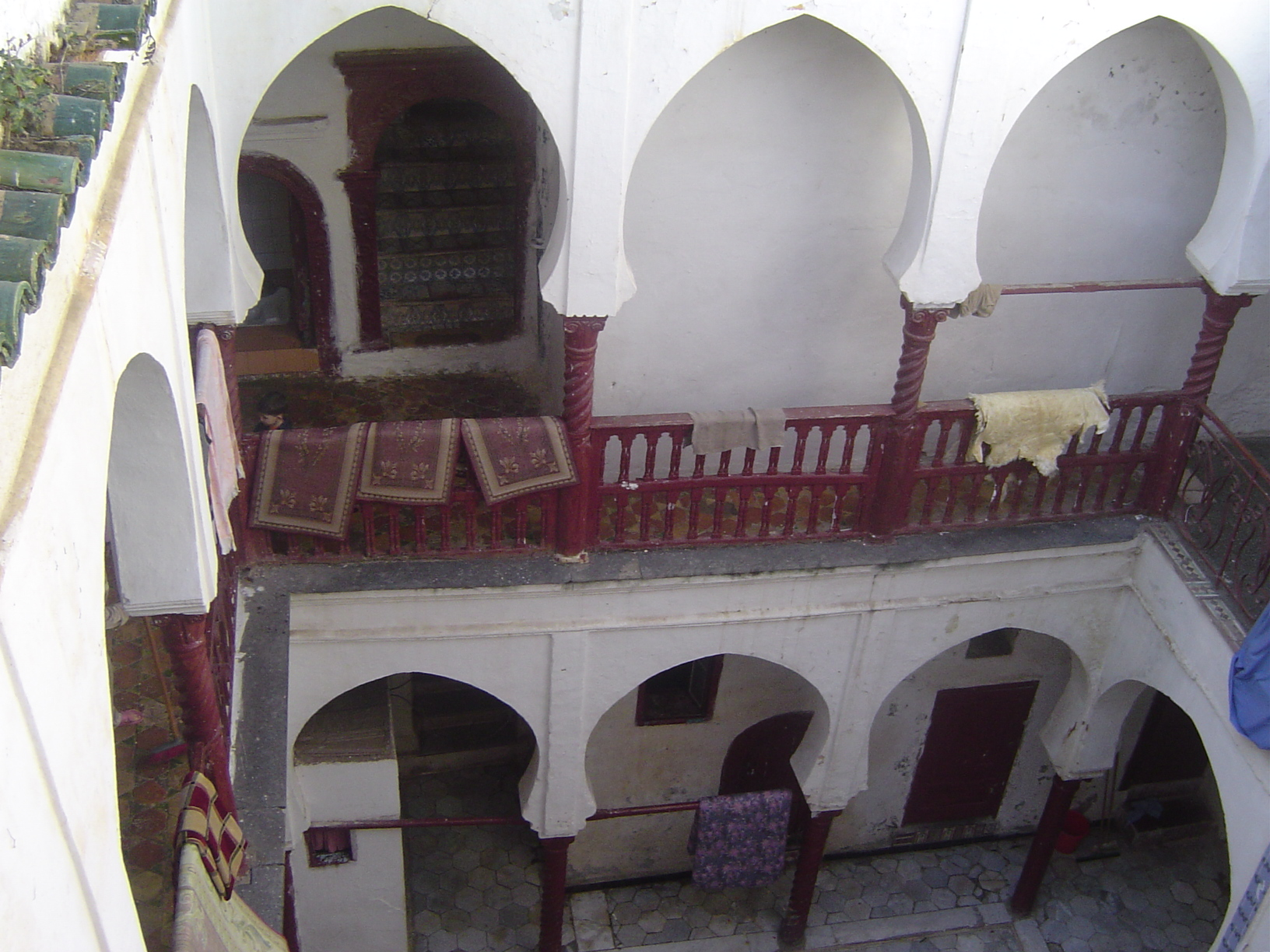 Maison de la Casbah.